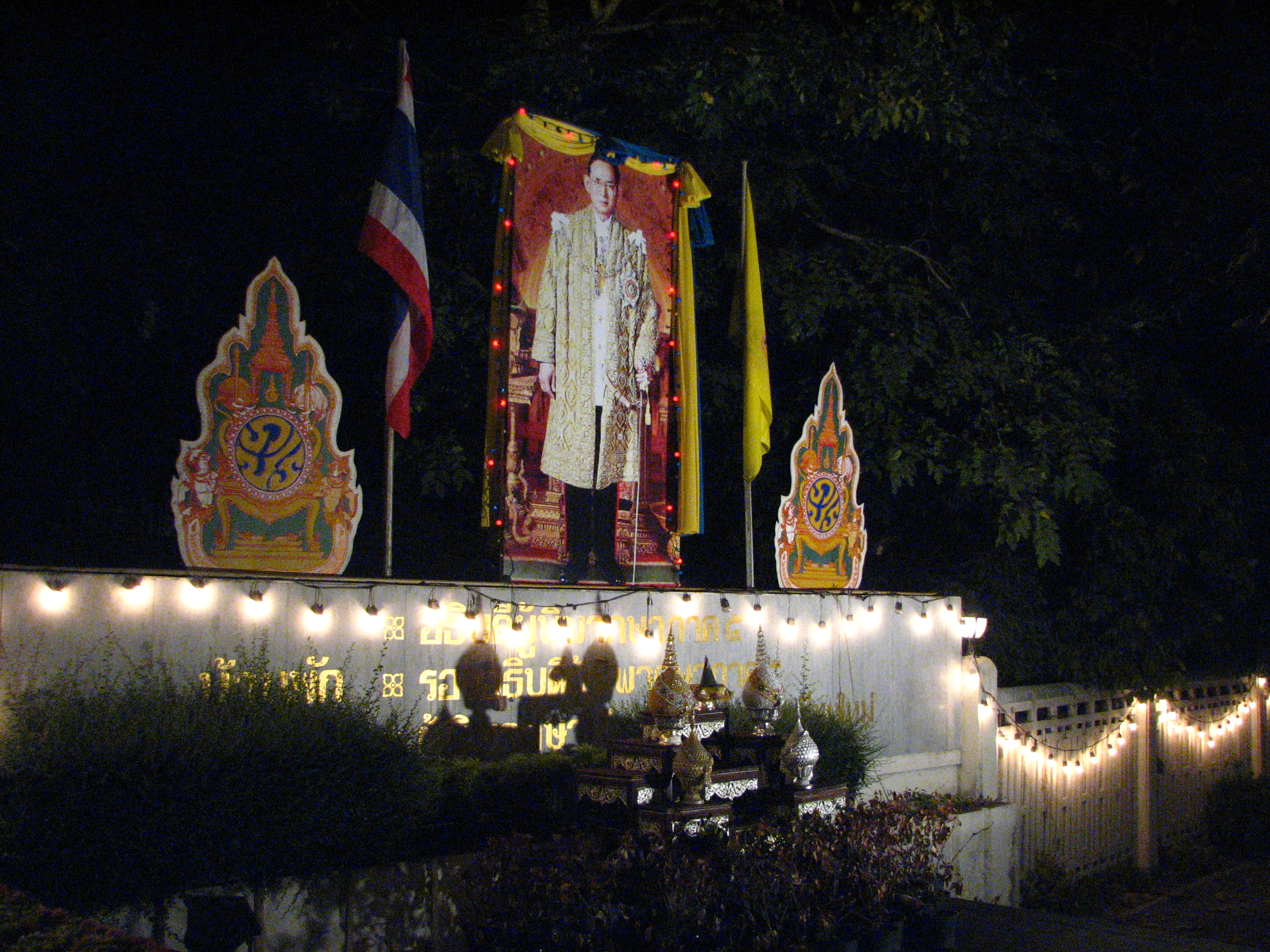 King Bhumibol image in Chiang Mai